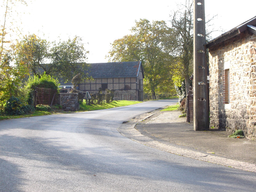 Le village de Cheneux